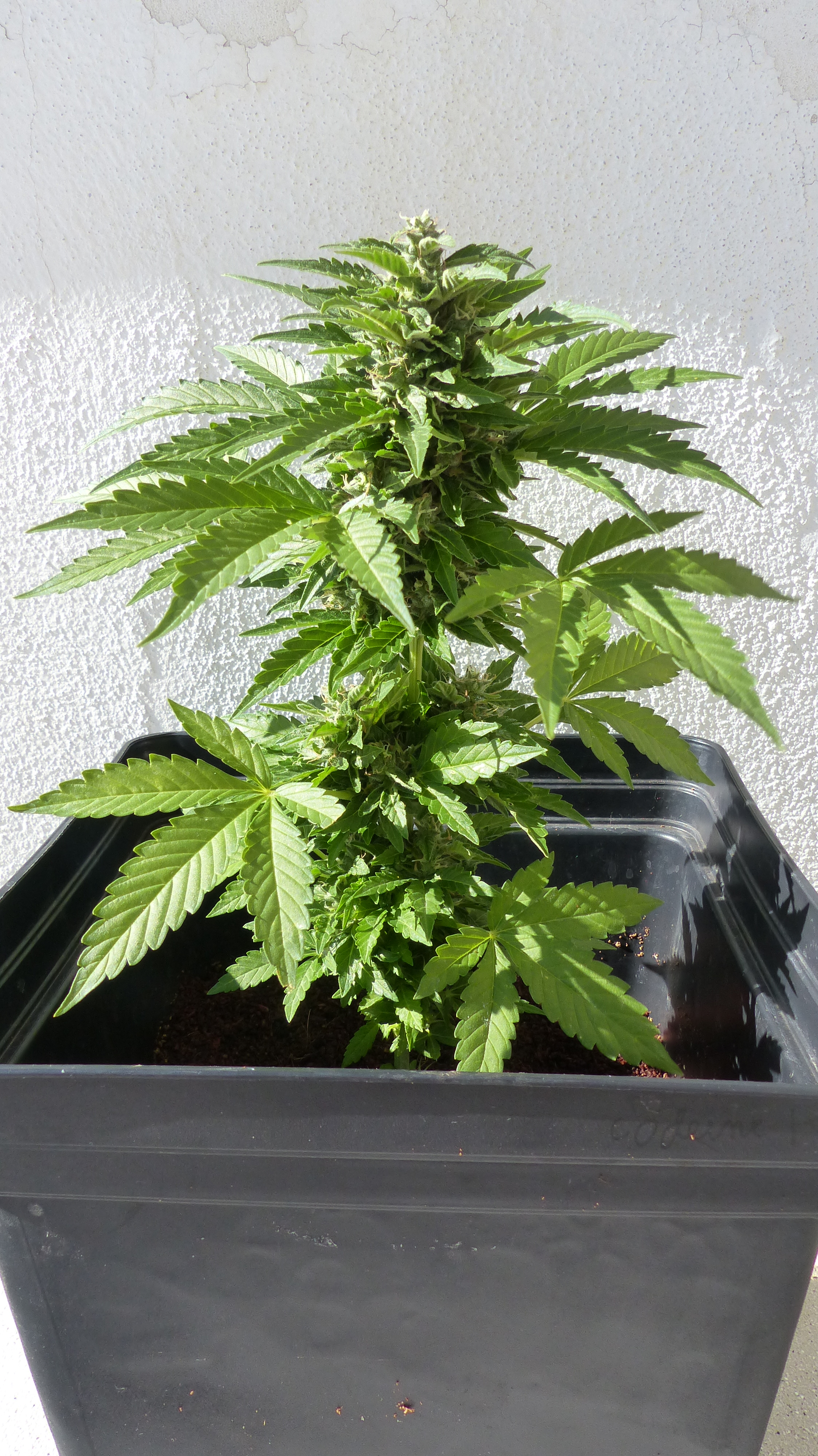 Une plante de cannabis autofloraison bientôt prête a la récolte.